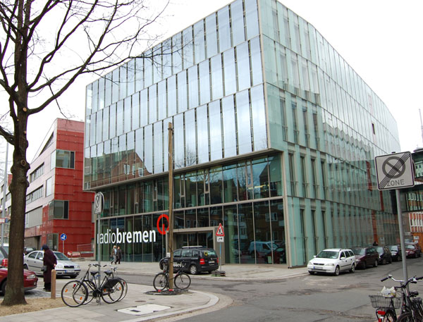 Neues Funkhaus von Radio Bremen - Redaktionshaus